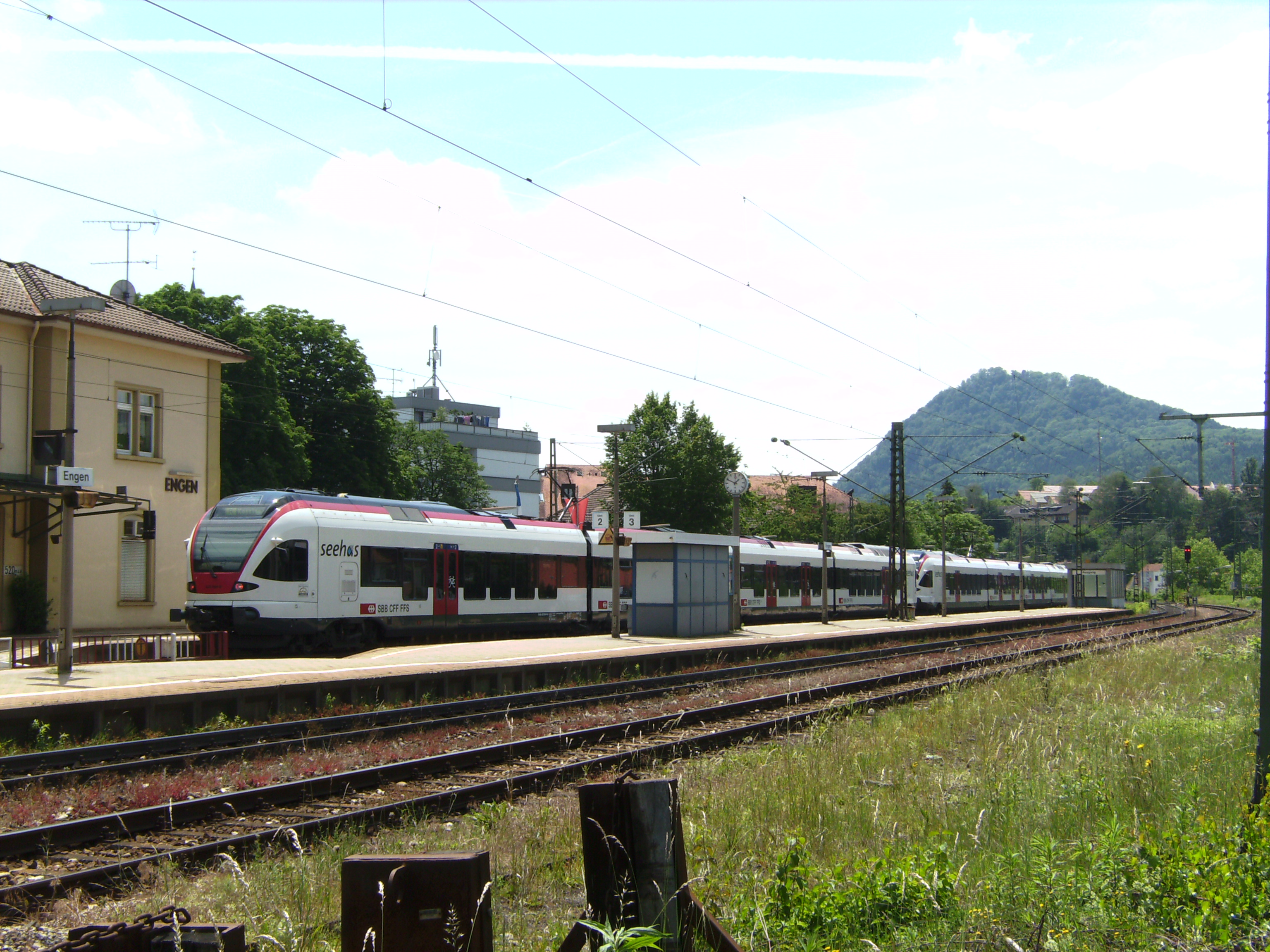 Ein „Seehas“-Zug aus Konstanz steht im Endbahnhof Engen, im Hintergrund der Hohenhewen